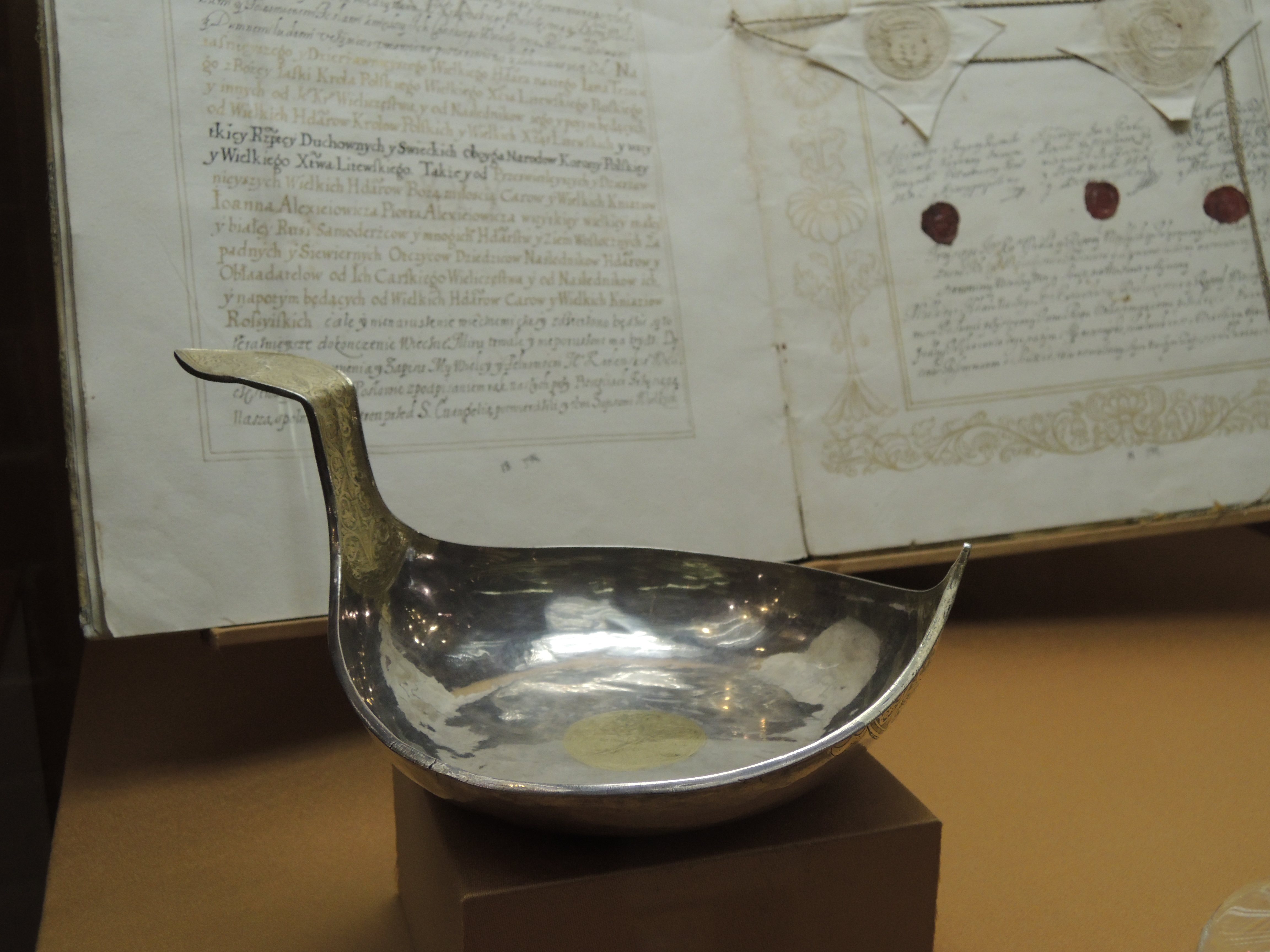 Ковш. Москва, к. 16 - нач. 17 вв. Надпись: "Ковш князя Ондрея Ондреевича Голицына", "КВВГ" (князь Василий Васильевич Голицын). Серебро. ГИМ